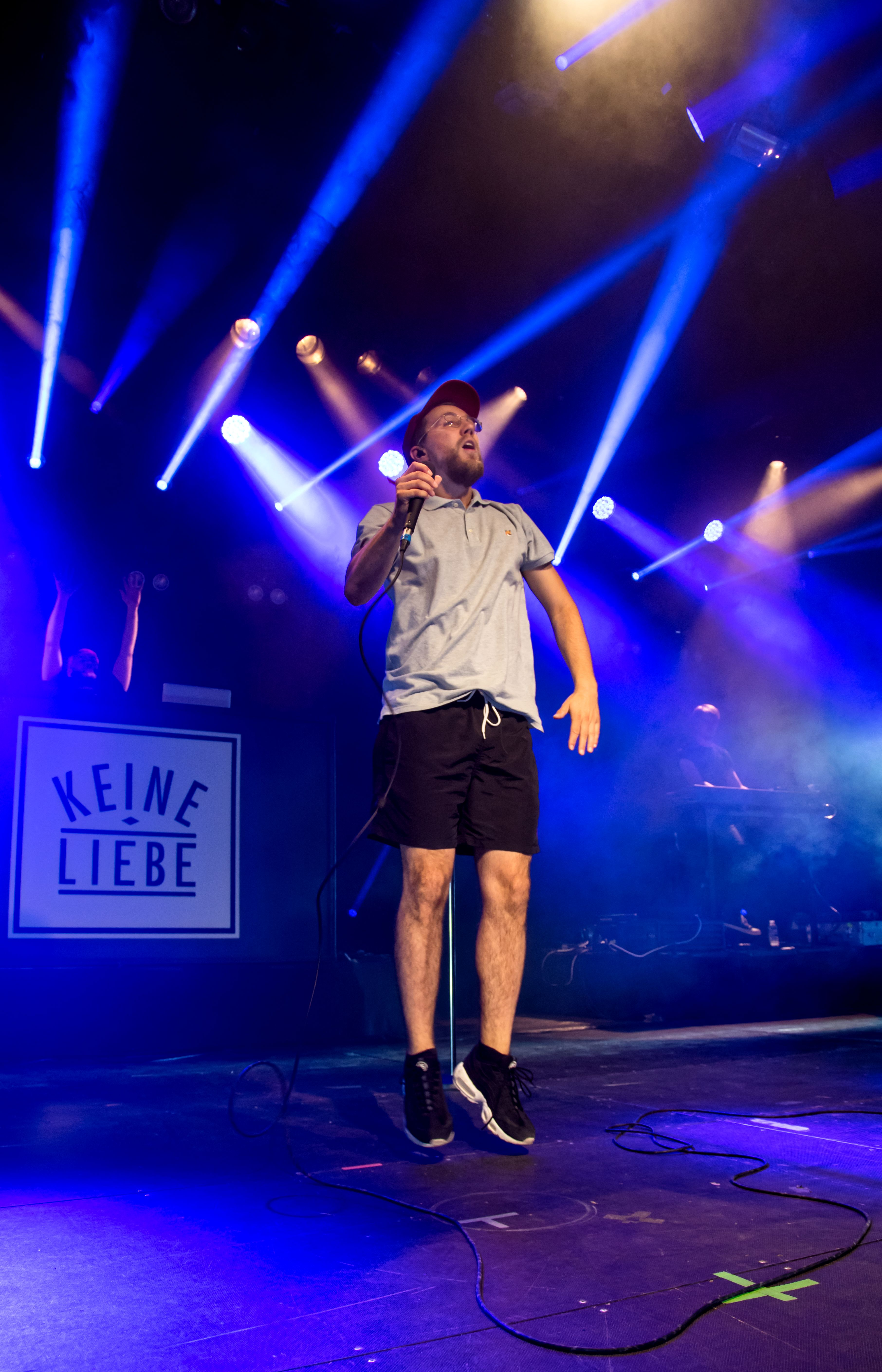 Bilder vom Zelt Musik Festival 2016 in Freiburg im Breisgau Prinz Pi